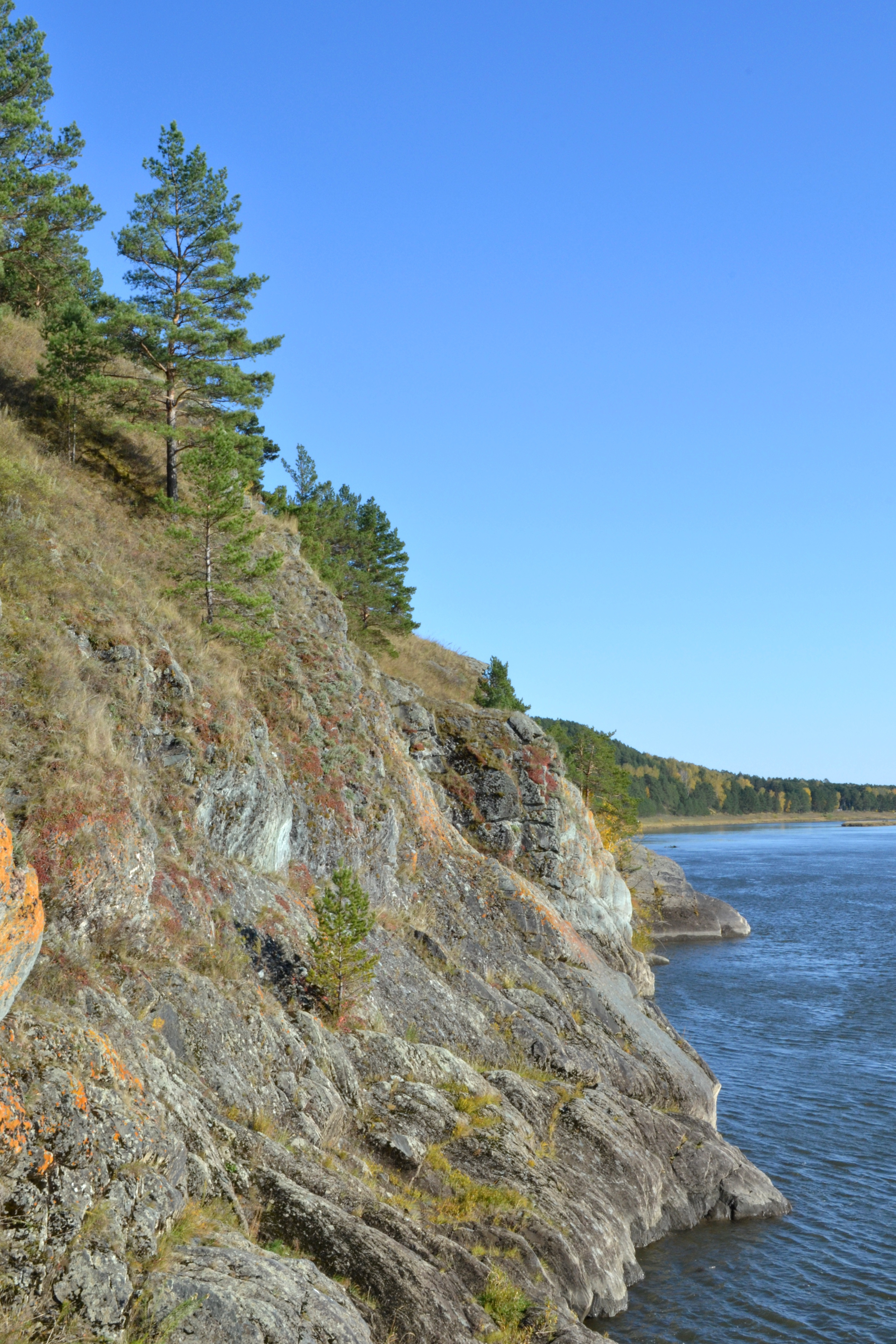 Писаный заказник, Кемеровский район This image is related to the protected area of Russia number 4210008